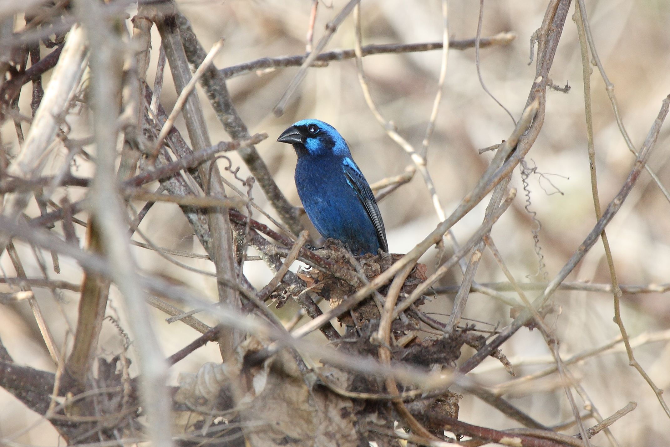 Blue Bunting (Cyanocompsa parellina)